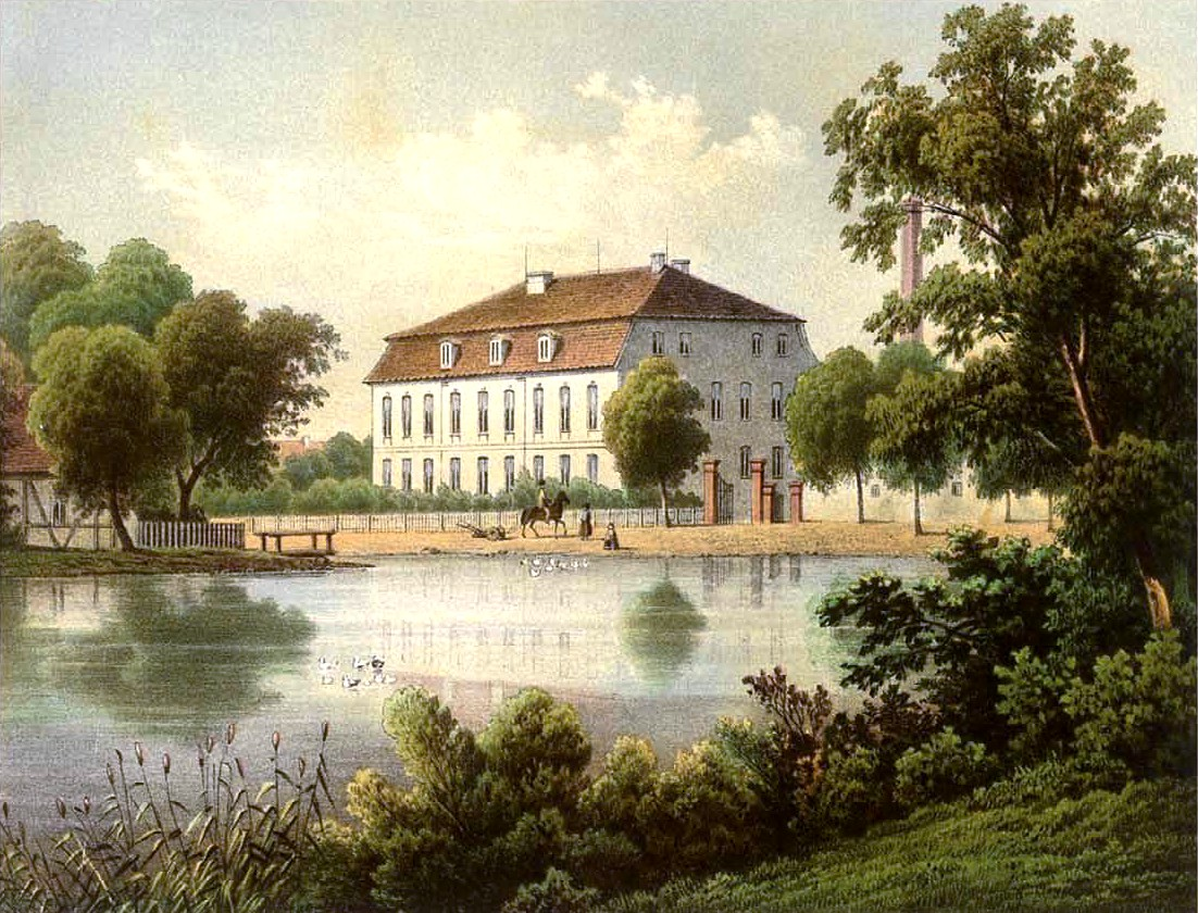 Schloss Gräfendorf, Kreis Jüterbog-Luckenwalde, Provinz Brandenburg, Lithografie aus dem 19. Jahrhundert